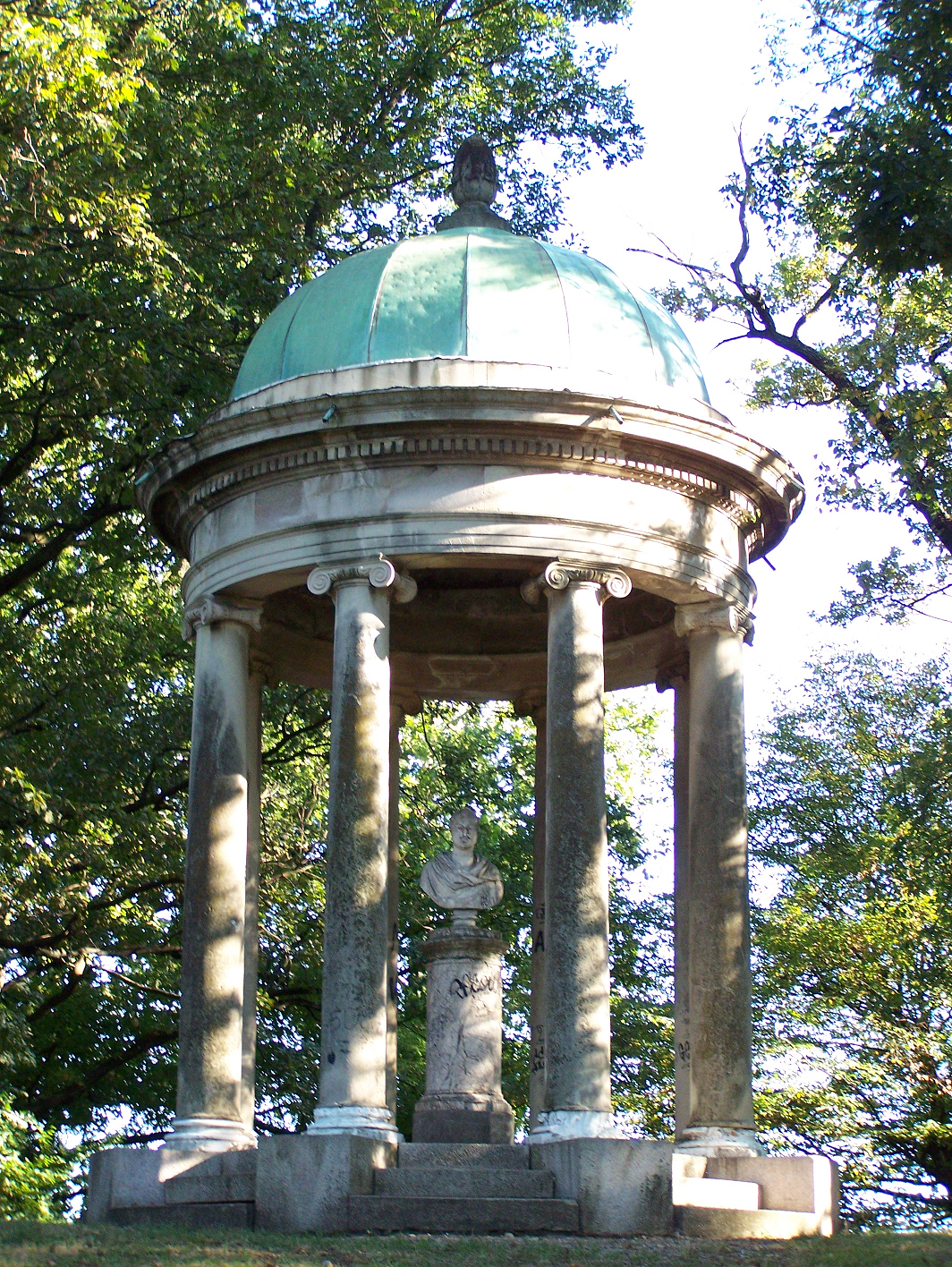 Tempietto neoclassico in fondo al giardino di Villa Annoni a Cuggiono (MI) - Italy